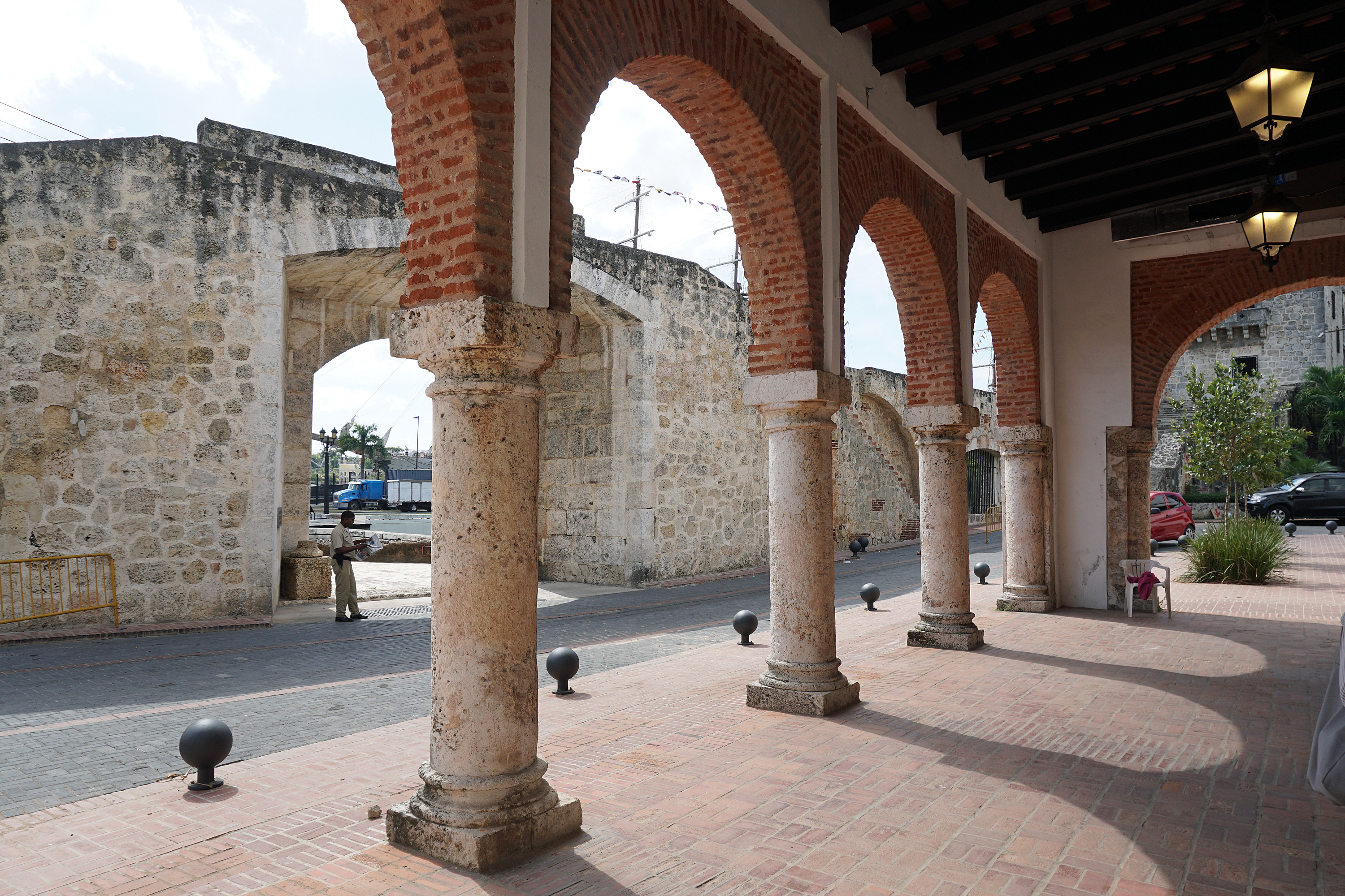 Vista de la Puerta de las Atarazanas desde la arcada del Museo Naval Atarazanas Reales, Ciudad Colonial Santo Domingo, República Dominicana.